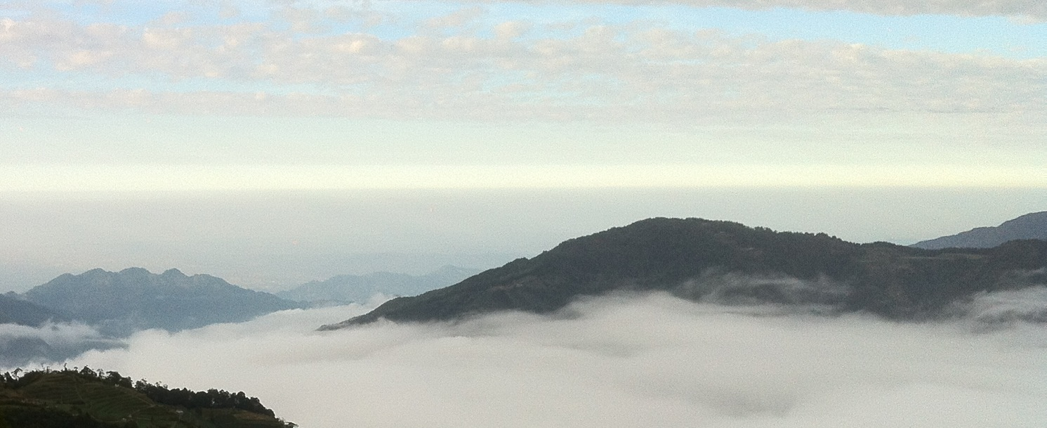 攝於大鹿林道23.5K